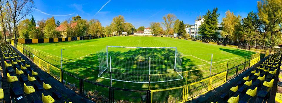 стадион Трајал